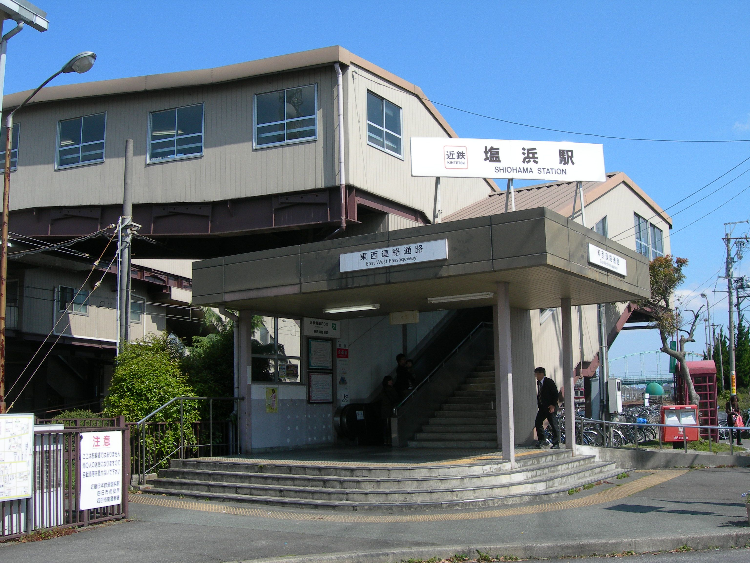 塩浜駅東口